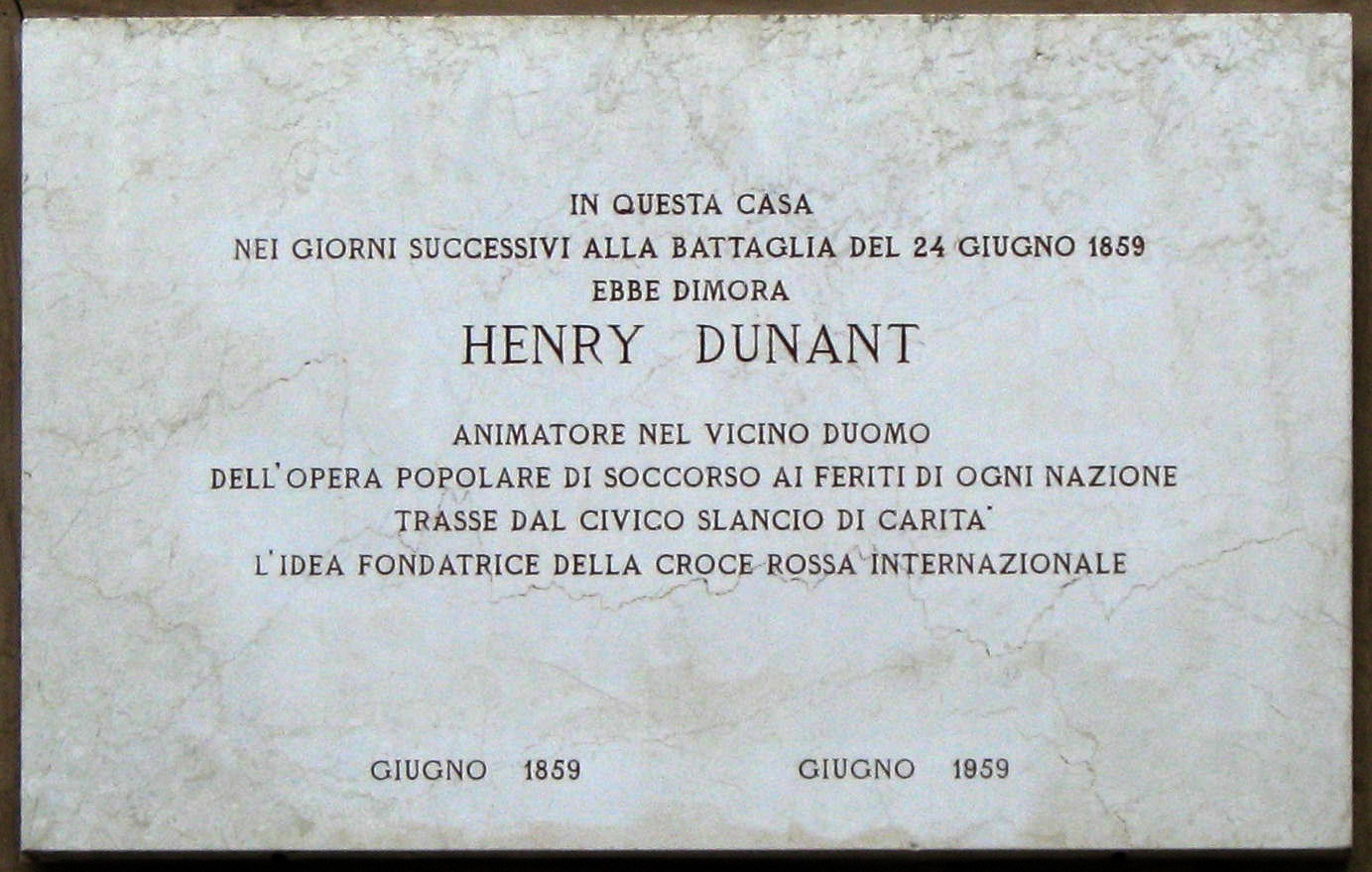 Castiglione delle Stiviere, lapide a Jean Henri Dunant.